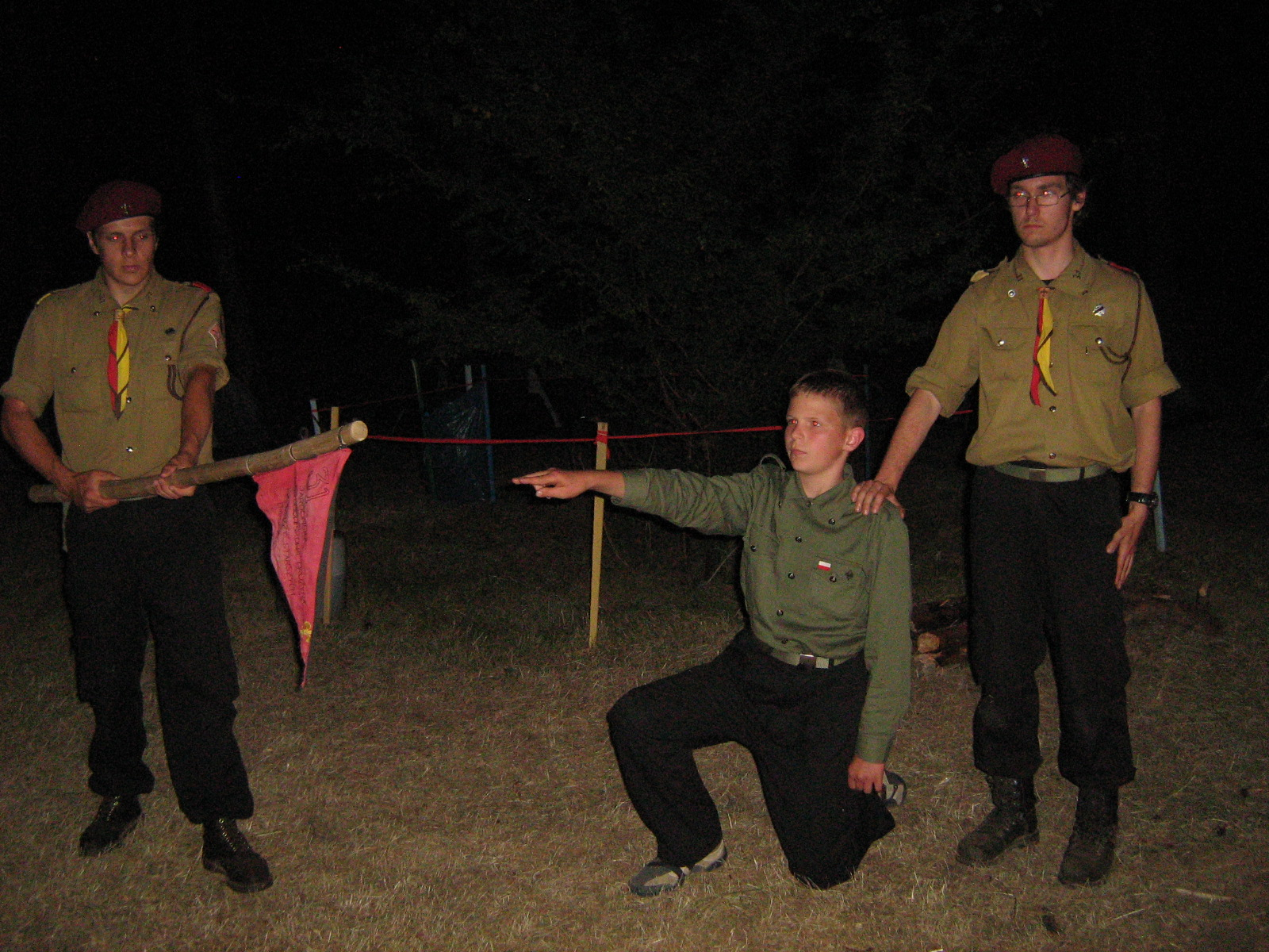 Chsutowanie